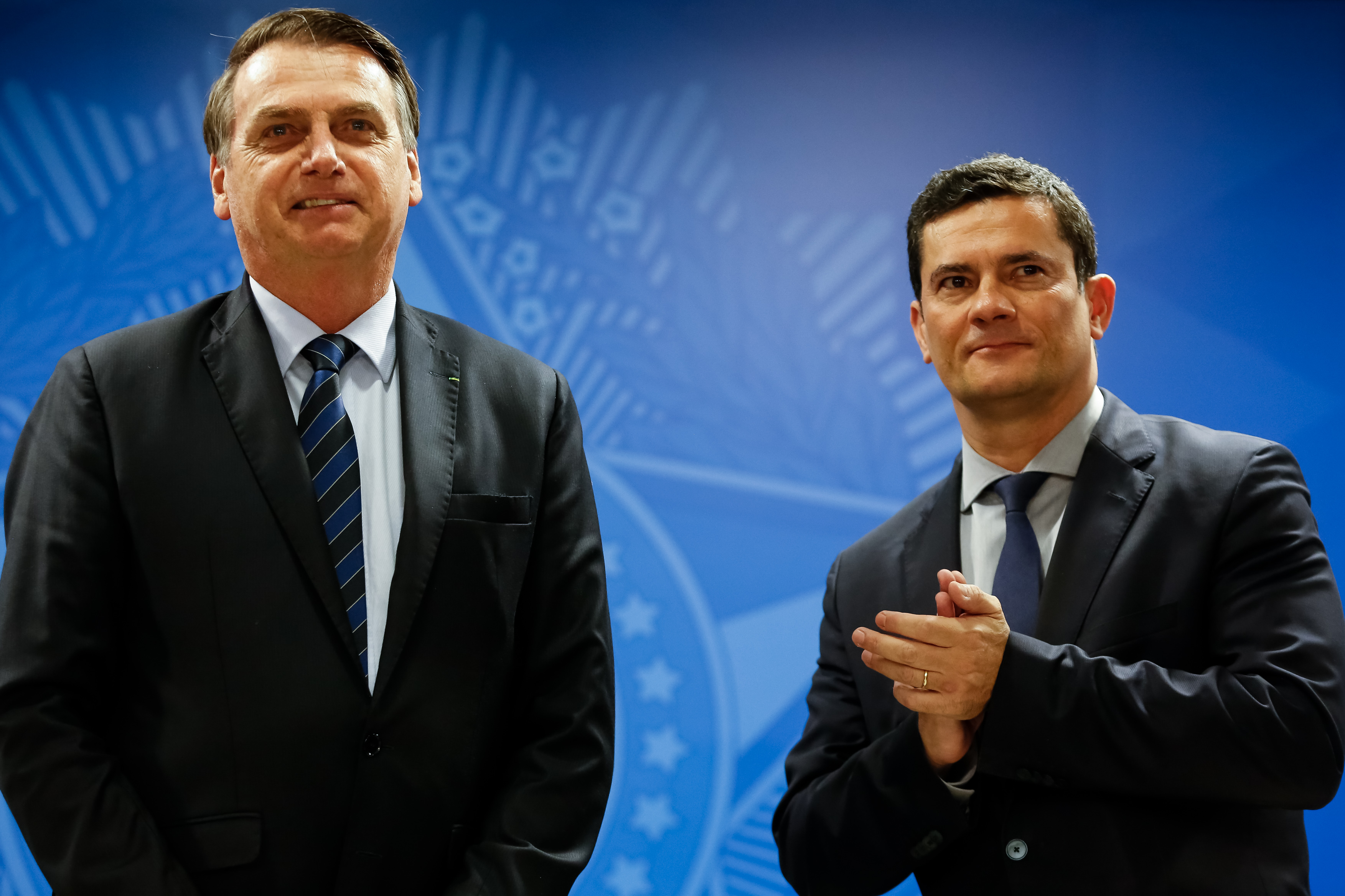 (Brasília - DF, 17/06/2019) Presidente da República, Jair Bolsonaro, e o Ministro de Estado da Segurança Pública, Sérgio Moro, durante solenidade de assinatura da MP para Confisco de Bens de Traficantes. Foto: Carolina Antunes/PR